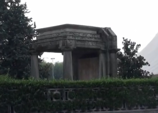 Cappella votiva alla vittoria nella prima guerra mondiale di fronte al cimitero comunale di Magenta (MI)